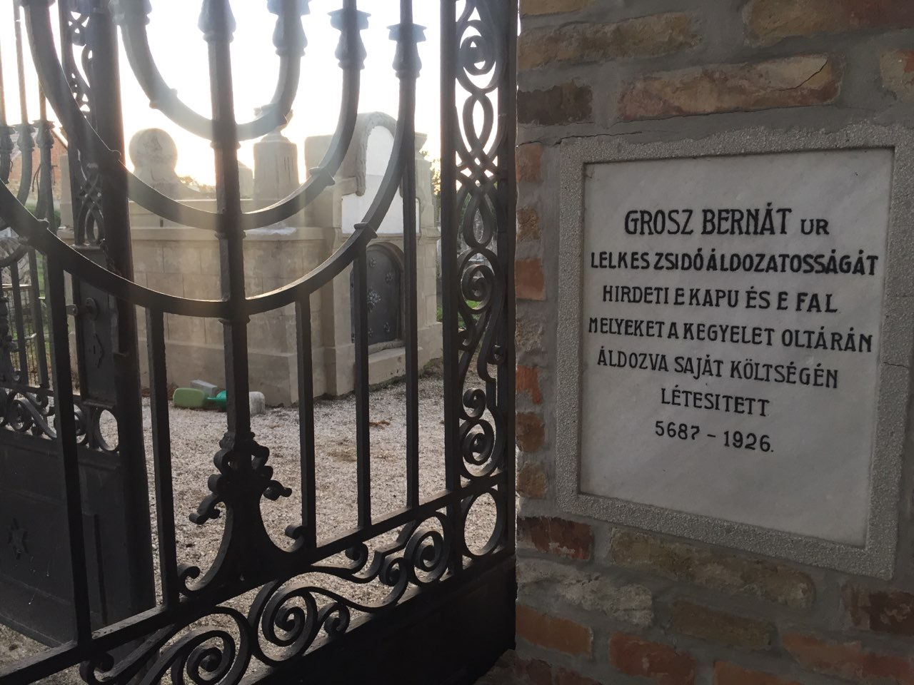 Grosz Bernát által épített temető kerítése, amit 2012-ben újított föl Székesfehérvár MJV Önkormányzata.